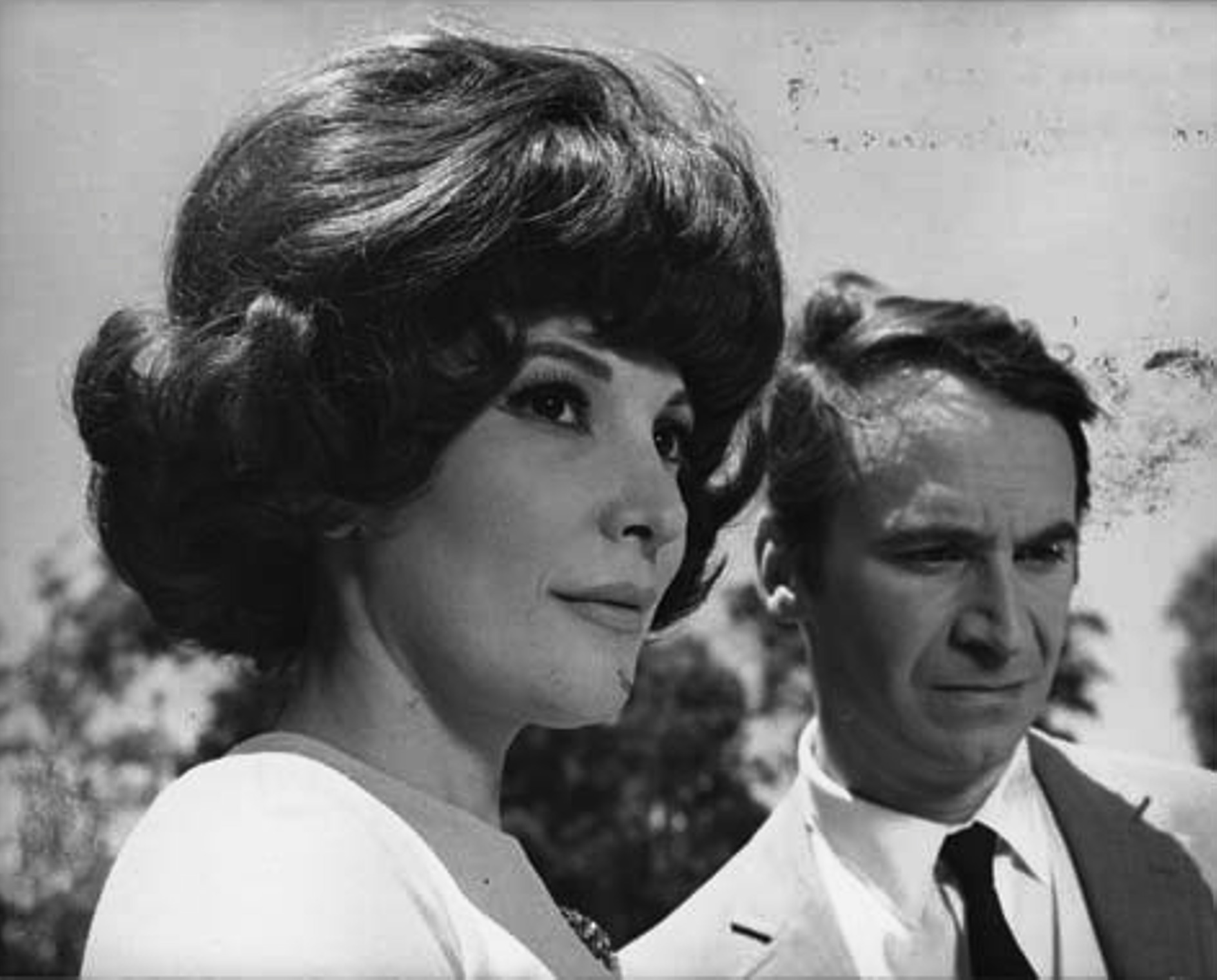 Irma Roy y Juan Carlos Altavista en "El derecho a la felicidad" (1968).